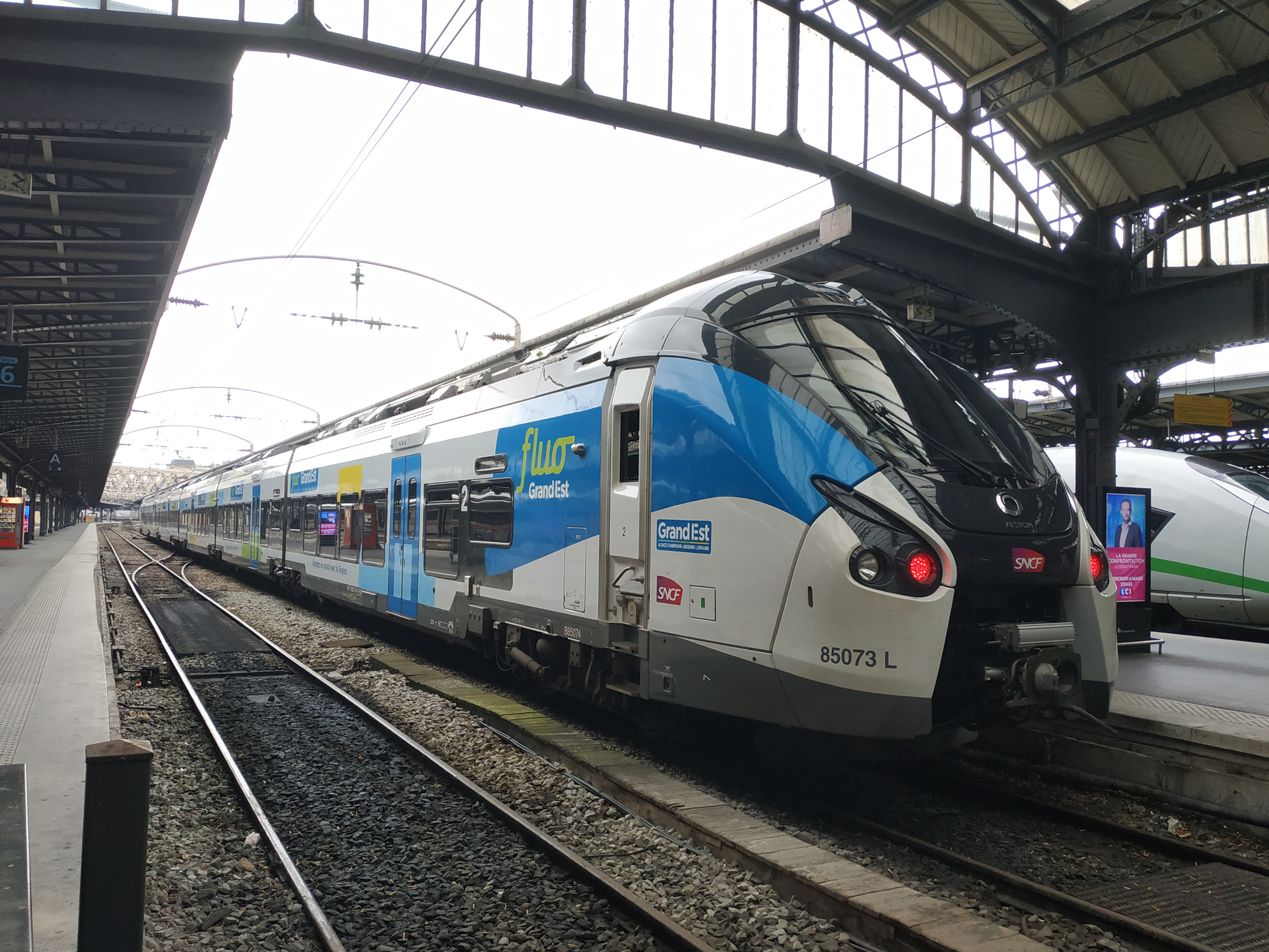 Alstom Regiolis - Coradia Liner Intercités B85073 du TER Grand Est en livrée Fluo Grand Est, vu ici à Paris Est